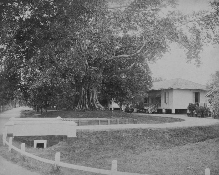 foto. Een waringin in een kampement met woningen voor legerofficieren te Neusoeh in Koetaradja